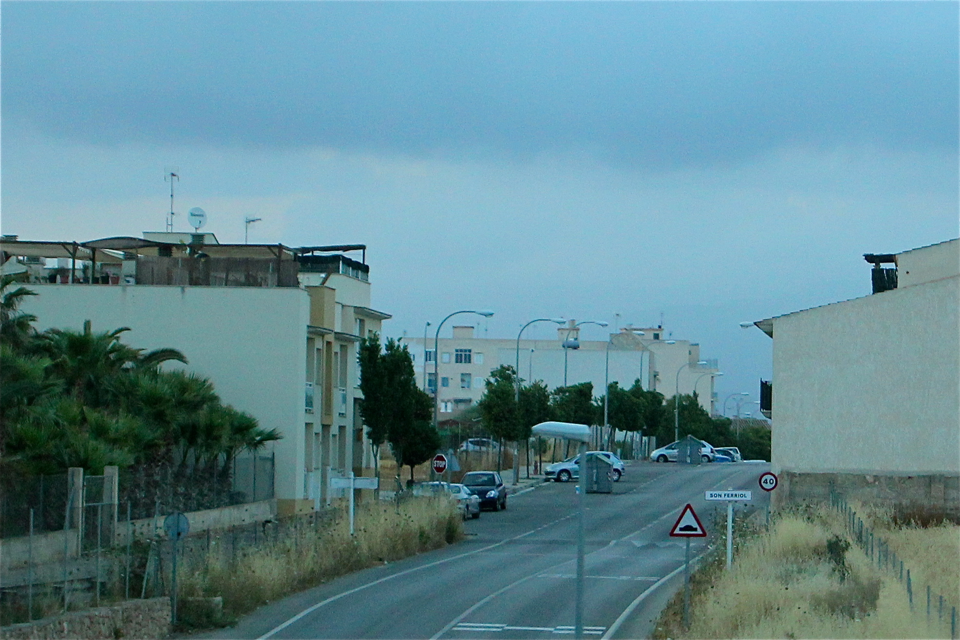 Entrada a Son Ferriol pel Camí de Son Banya